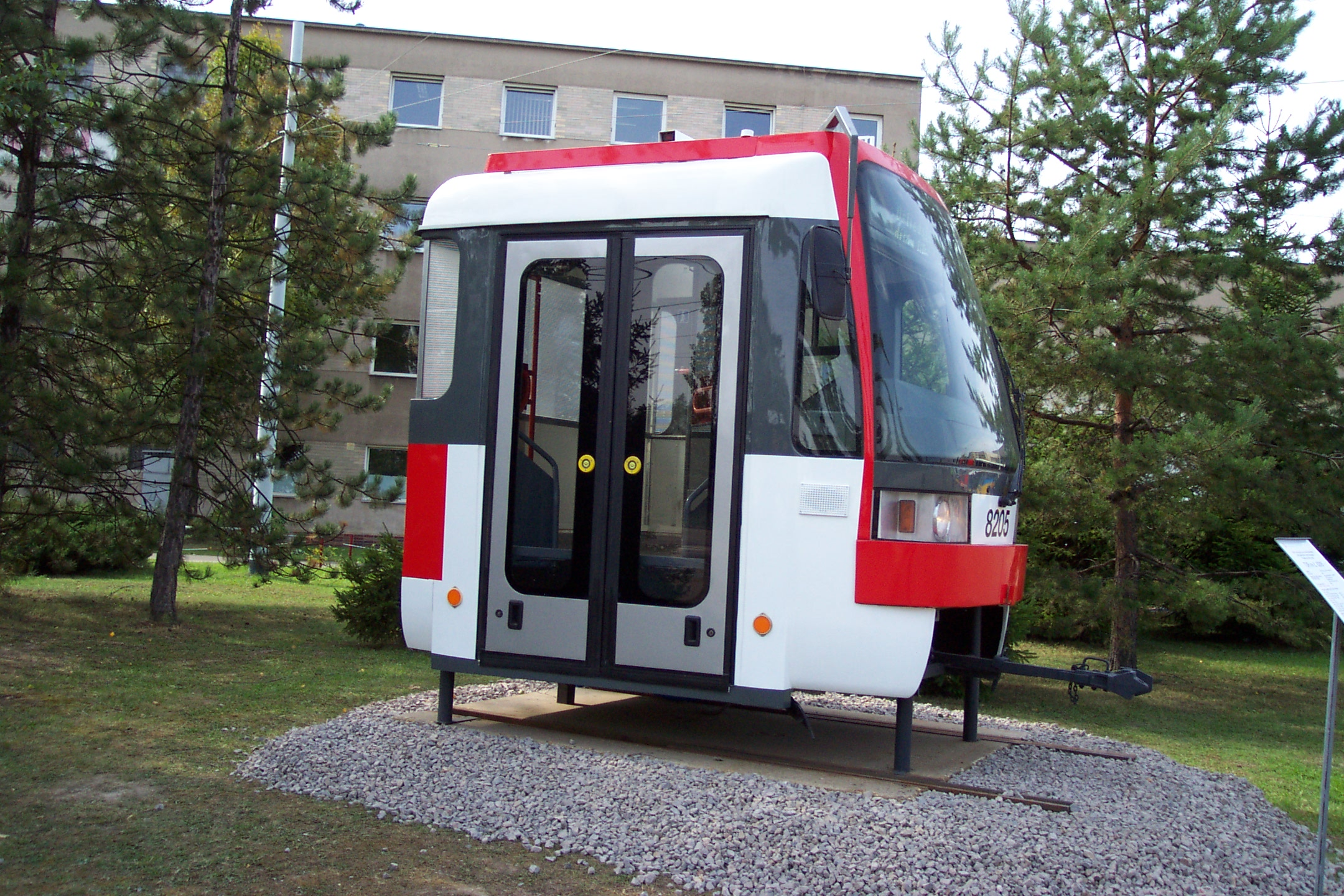 Tram type T3R rebuilt as memorial in 2006 - Tramvaj typu T3R přebudovaná jako památník